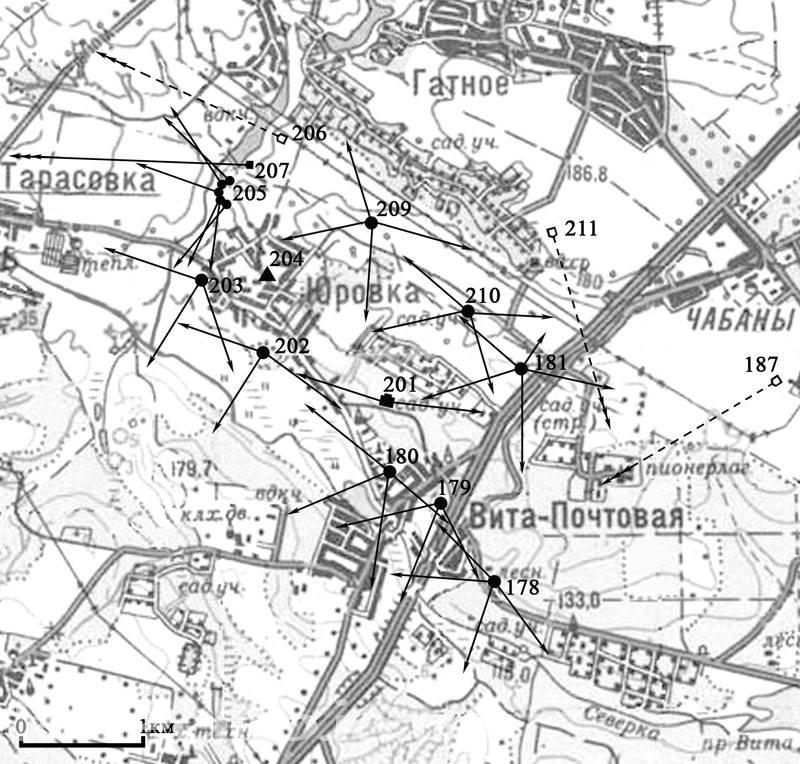 Схема БРО 6 Київського укріпленого району, викладена у вільний доступ авторами книги "Киевский укрепленный район 1928—1941" (